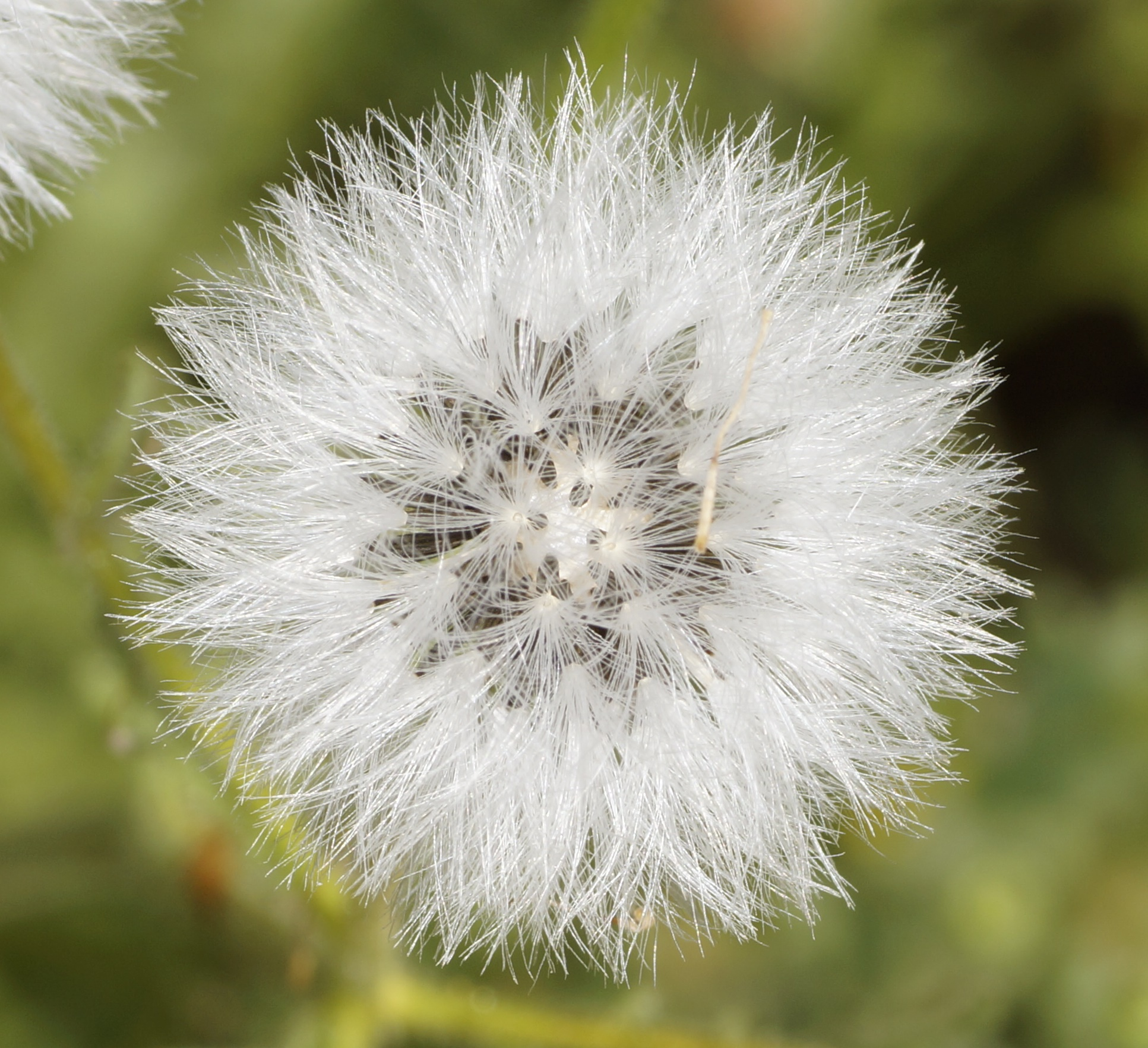 Klebriges Greiskraut, Asteraceae, Deutschland, Bayern, Oberfranken, Selbitz Foto: U.Schmidt, 27.VII.2012